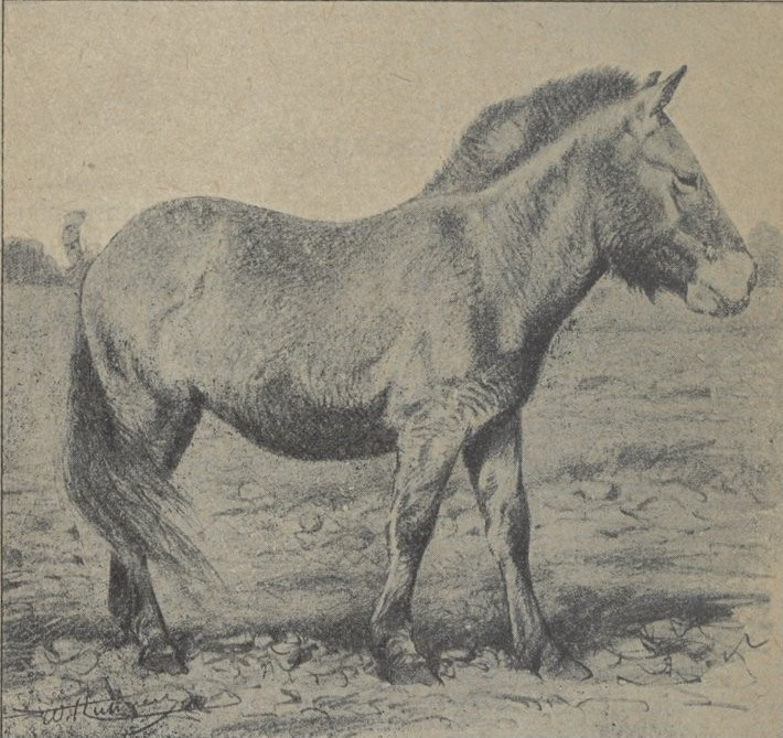 Tarpan dans Zootechnie. Races chevalines, 1923, par Paul Diffloth.